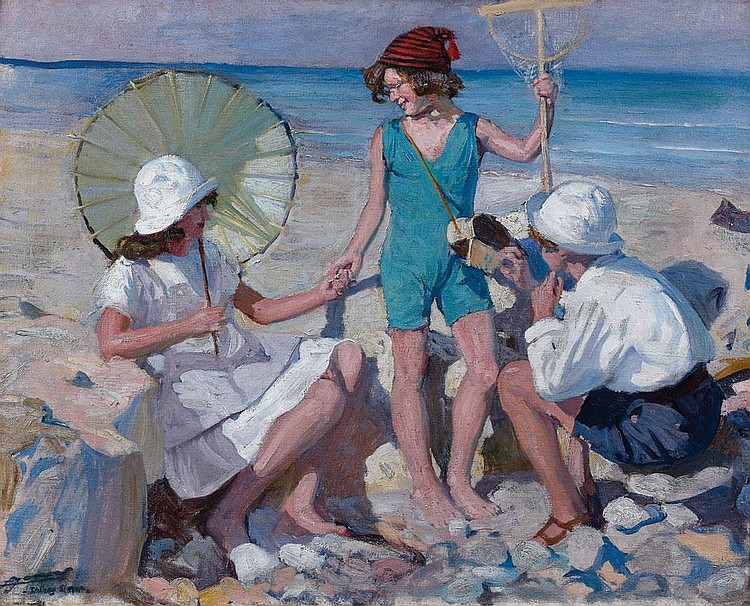 картины художника Люсьен Гектор Йонас (1880 — 1947)